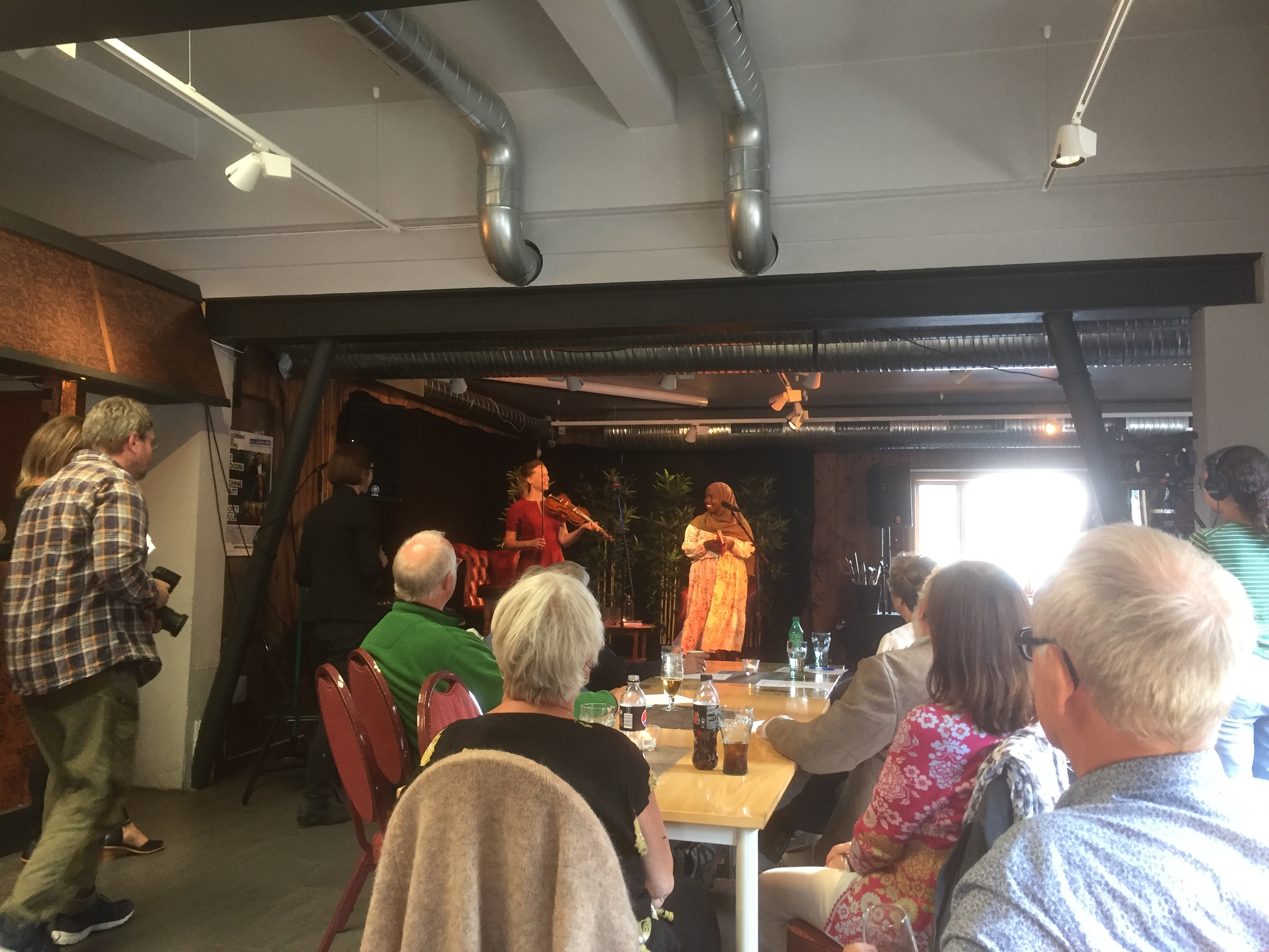 Poet og Årets Stemme Sumaya Jirde Ali (20) (t.h.) leser fra sin kommende diktsamling "Melanin hvitere enn blekemiddel", mens Spellemannprisvinner Anne Hytta går i samspill med henne. På Teledølen, Notodden, lørdag 25. august 2018. Først fremføring og presentasjon av Alis første bok på Aschehoug.